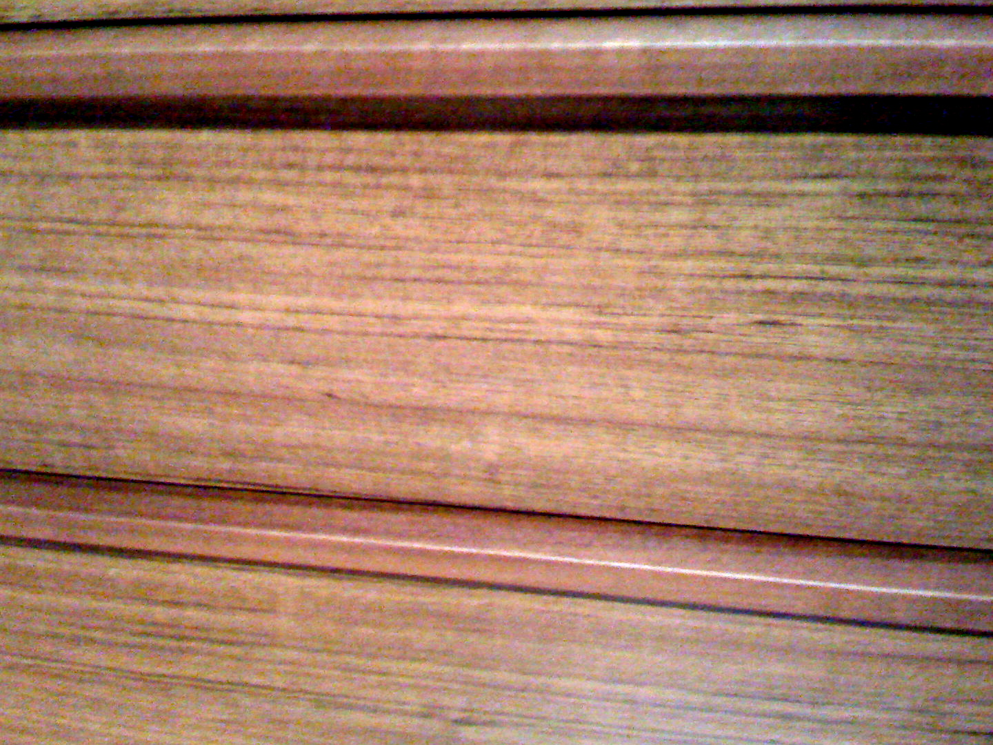 Wood-Ovangkol